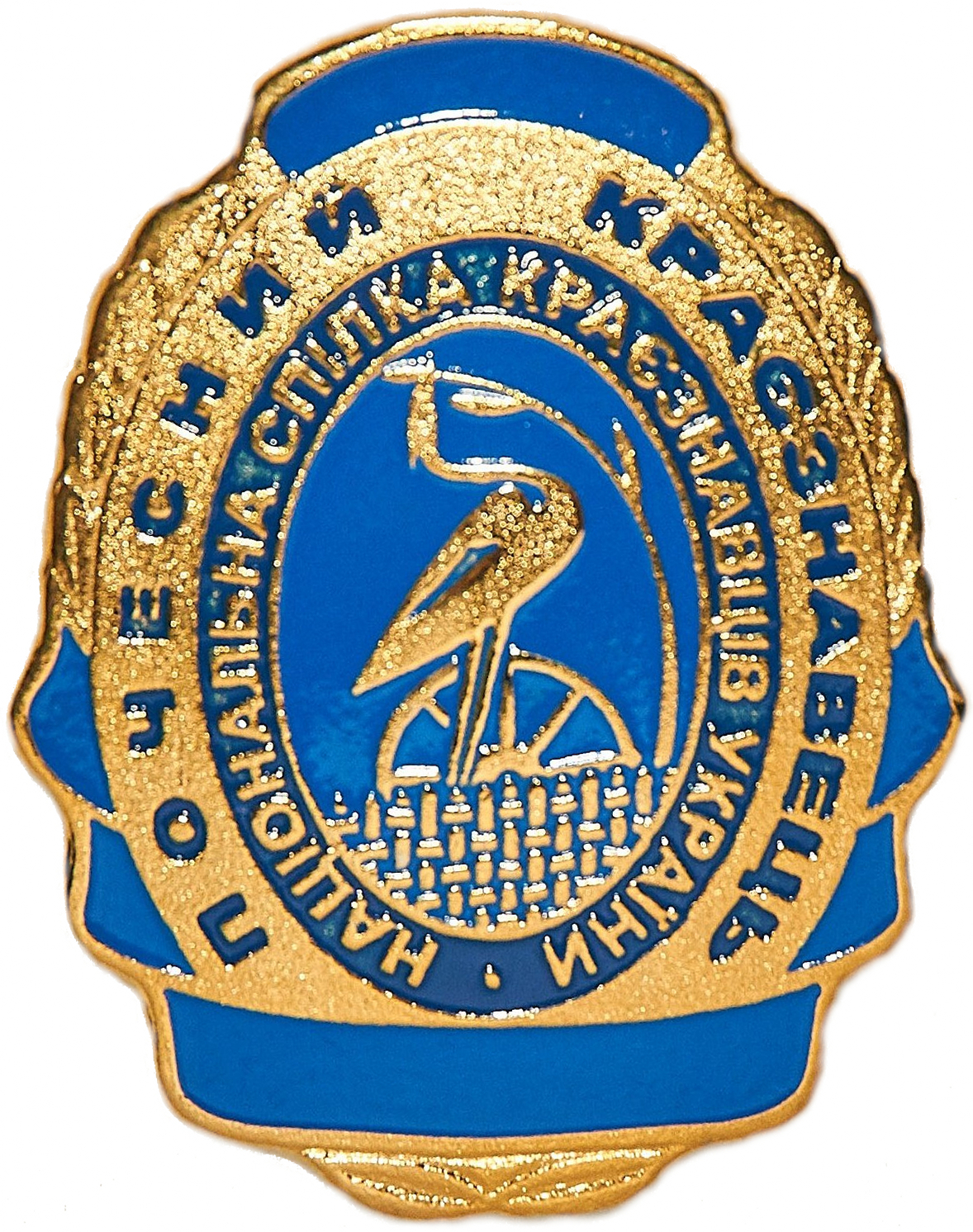 Фотографія нагрудного знаку "Почесний краєзнавець України", що вручається особі, якій Національна спілка краєзнавців України надала відповідне звання.